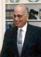 Ahmed Asmat Abdel-Meguid